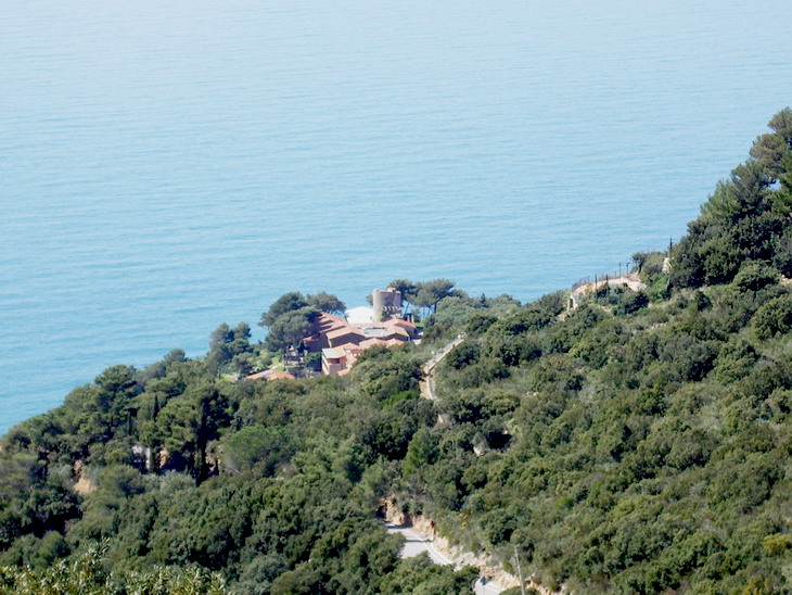 La Torre di Cala Piccola vista dalla strada panoramica a Monte Argentario